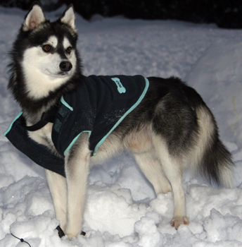 Standard Male Alaskan Klee Kai named Kukai